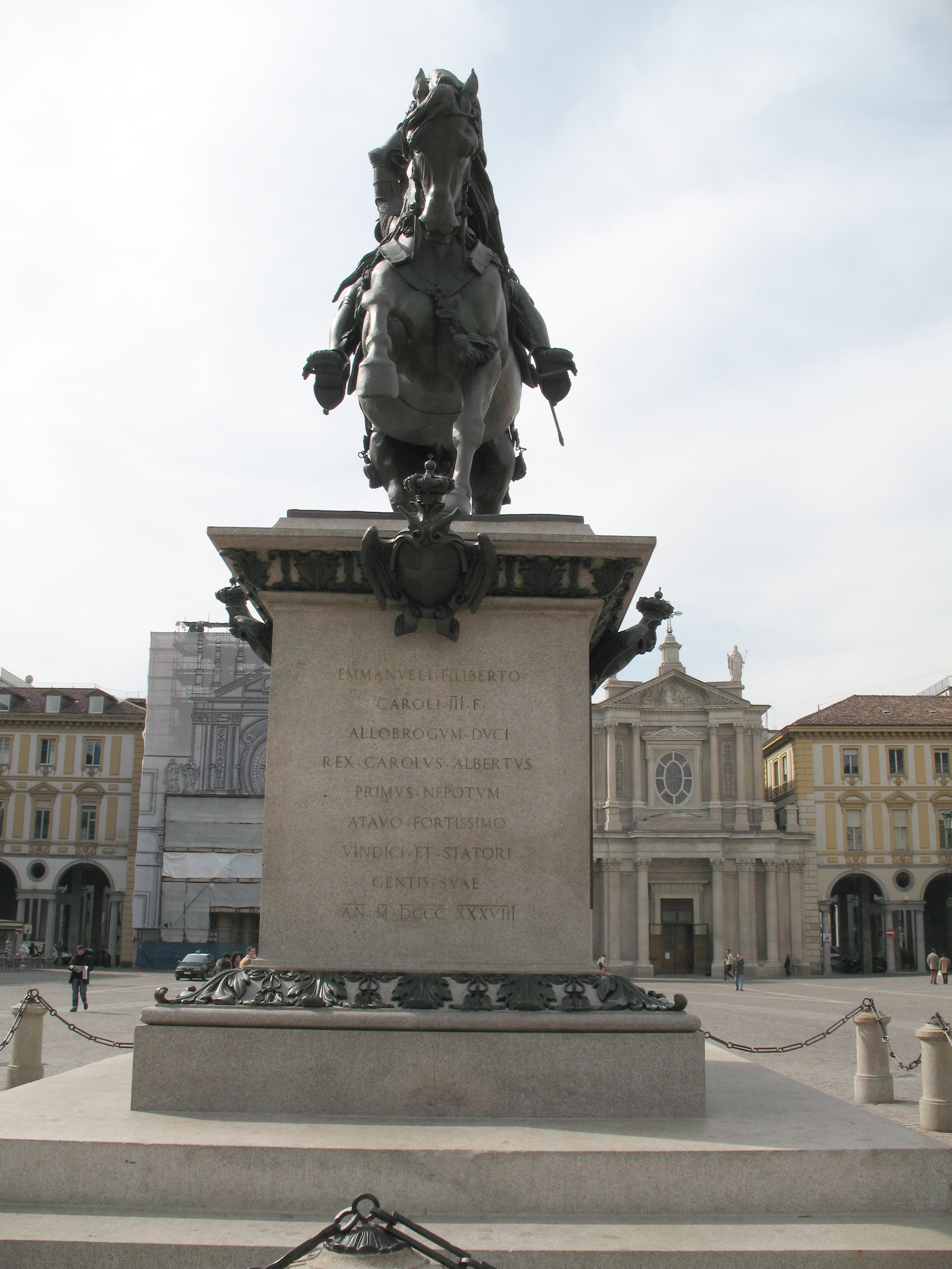 Statua equestre ad Emanuele Filiberto di Savoia - Piazza san Carlo - Torino - Italy